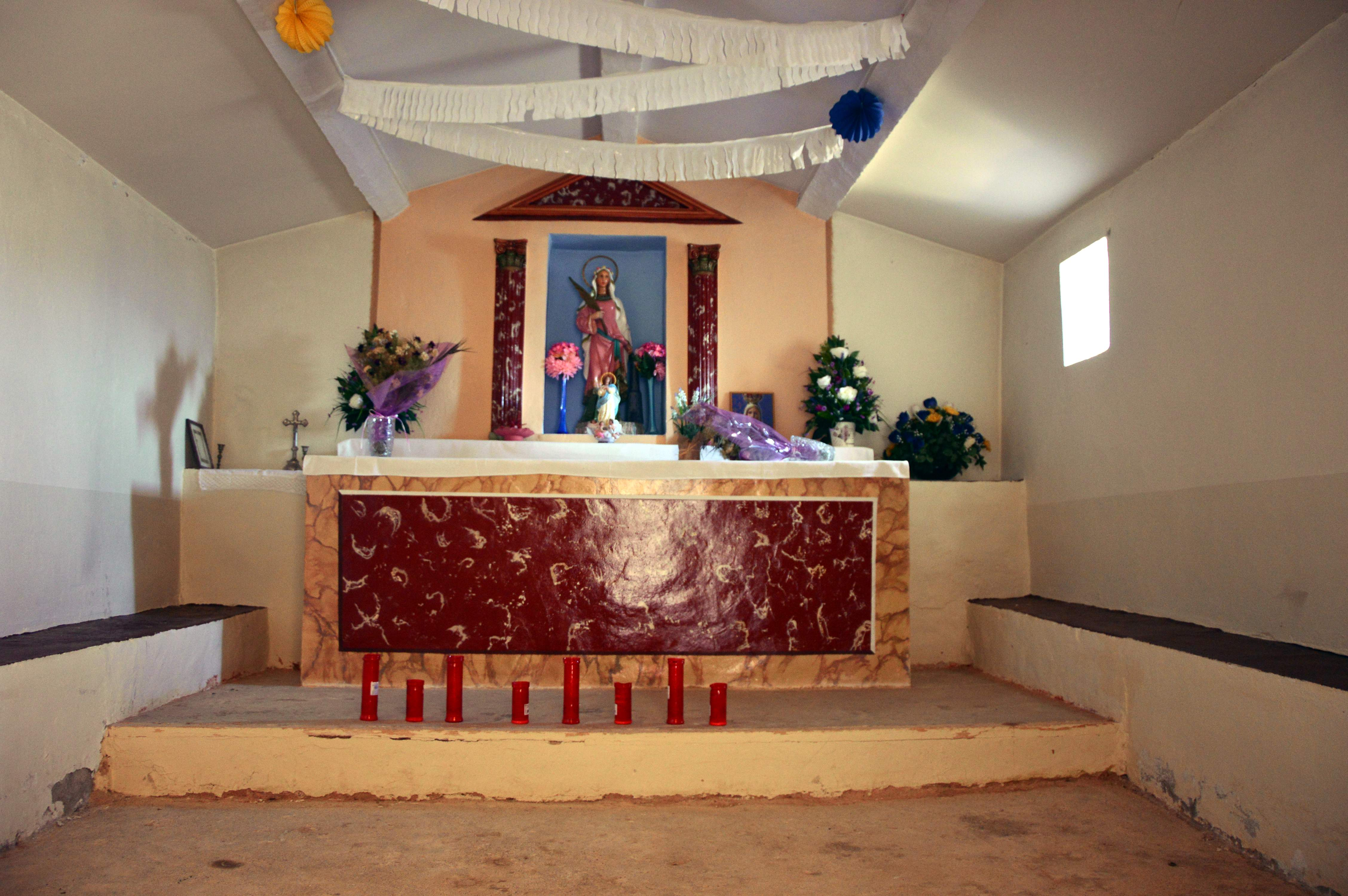 Vista general del interior de la Ermita de Santa Bárbara en Riodeva (Teruel), con el presbiterio al fondo (2017).